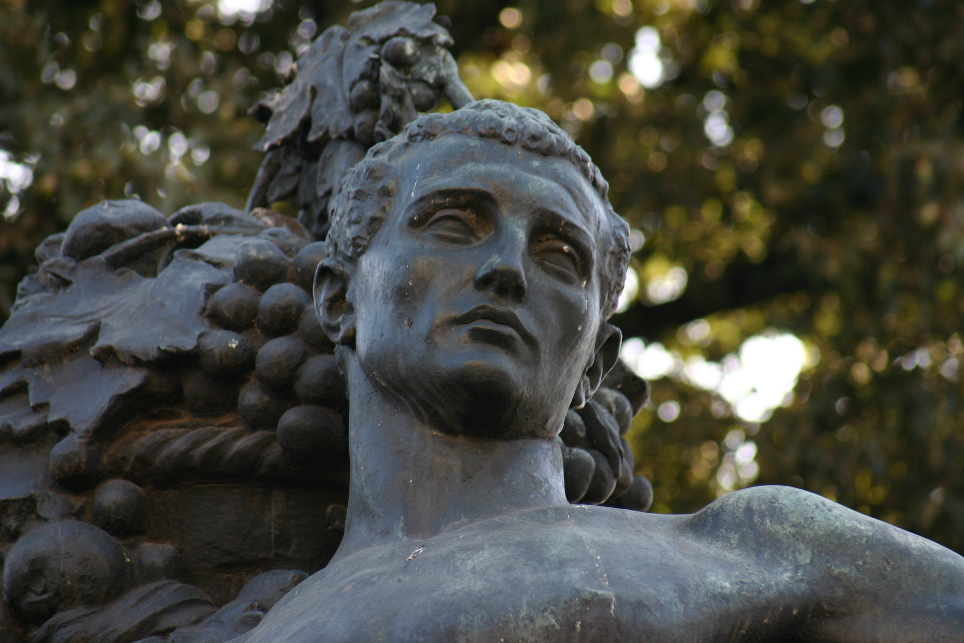 Girona. Plaza Catalunya. Barcelona (Spain) Codi: 2009